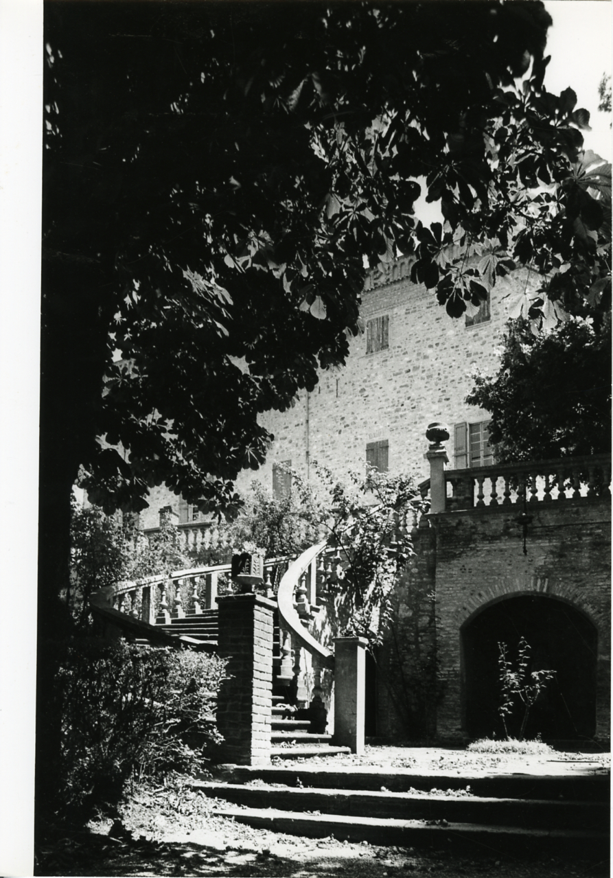 Servizio fotografico : Ziano Piacentino, 1981 / Paolo Monti. - Stampe: 4 : Positivo b/n, gelatina bromuro d'argento/ carta, 24x30. - ((Al verso delle stampe manoscritti i numeri dei negativi corrispondenti: 90/3, 90/6, 90/8, 90/10, . Sul coperchio della scatola, manoscritto a pennarello: "Città Storiche/ Piacenza". - Occasione: Documentazione di antiche ville nel territorio (secondo accordi con il Signor Tirotti). - Fonte: Fattura di Paolo Monti: IV. Commesse/ Fattura n. 44/ Riprese fotografiche antiche ville nel territorio di Piacenza (1981/12/30), presso Archivio Paolo Monti. N. 140 riprese stampate in formato 24x30